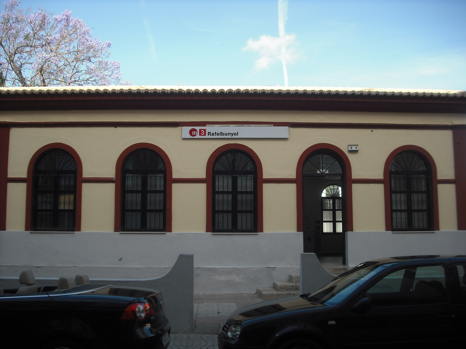 Estació de Metro.